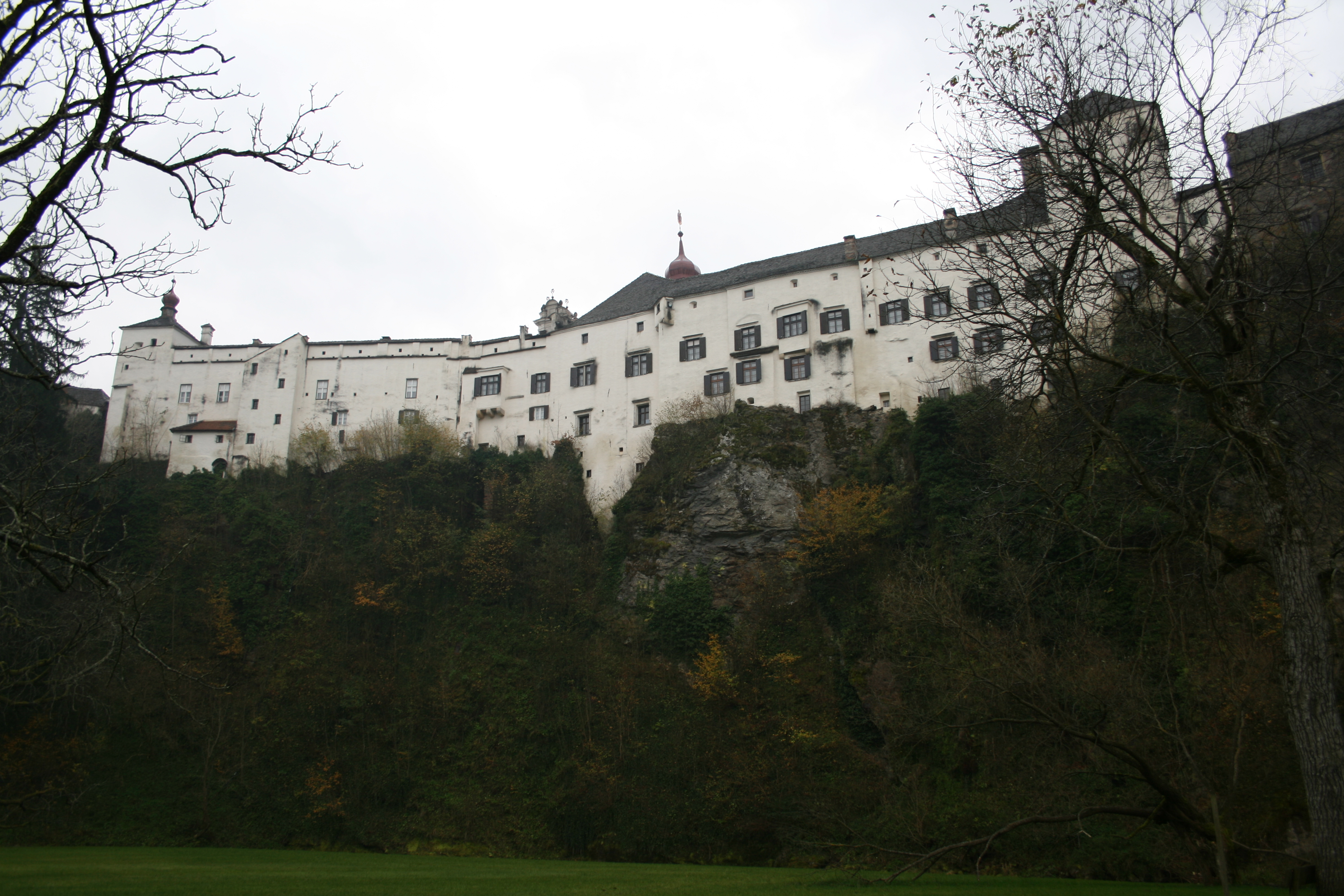 Schloss Herberstein, Steiermark (Styria, Austria, Cheetah)